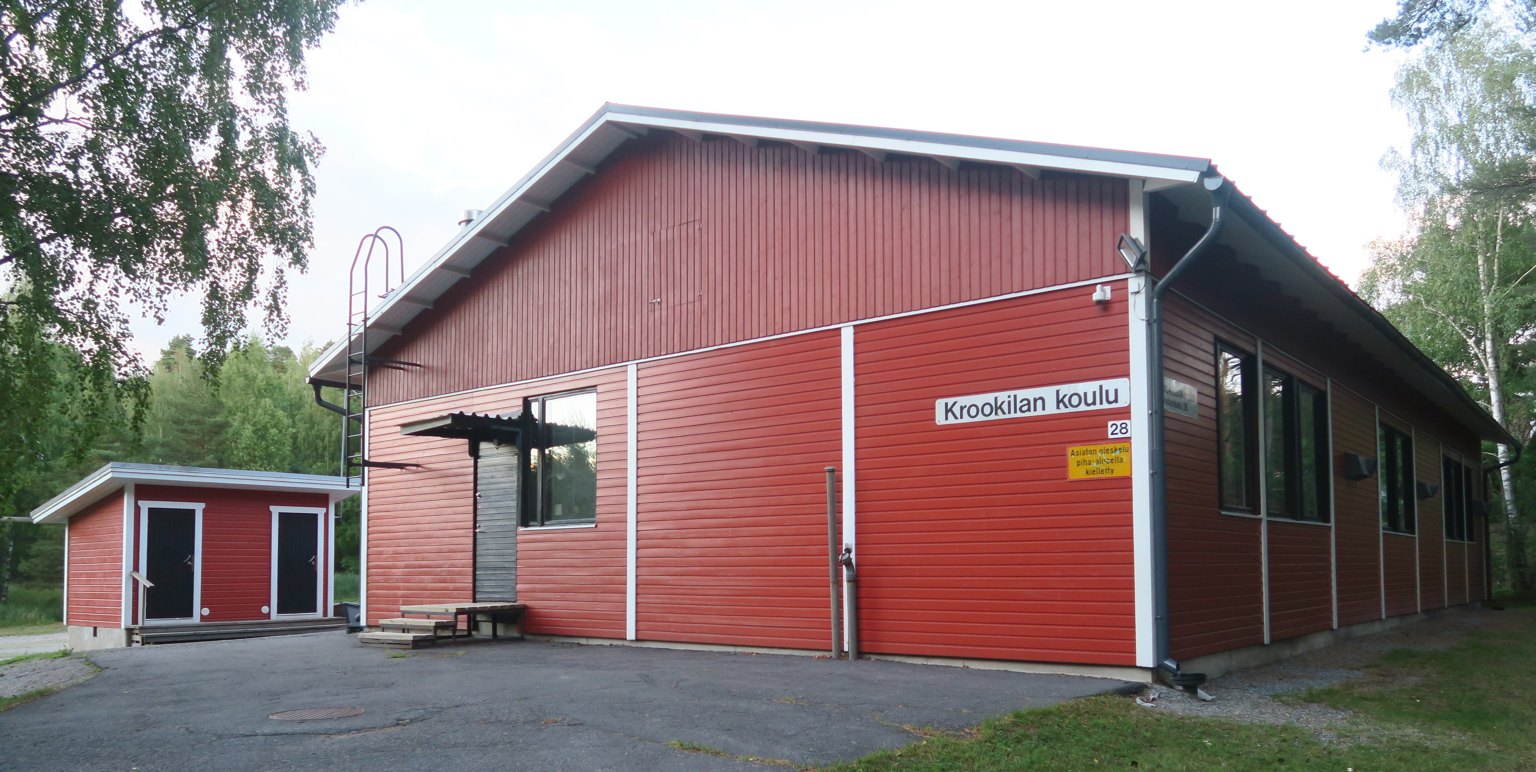 Krookilan koulu Raisiossa